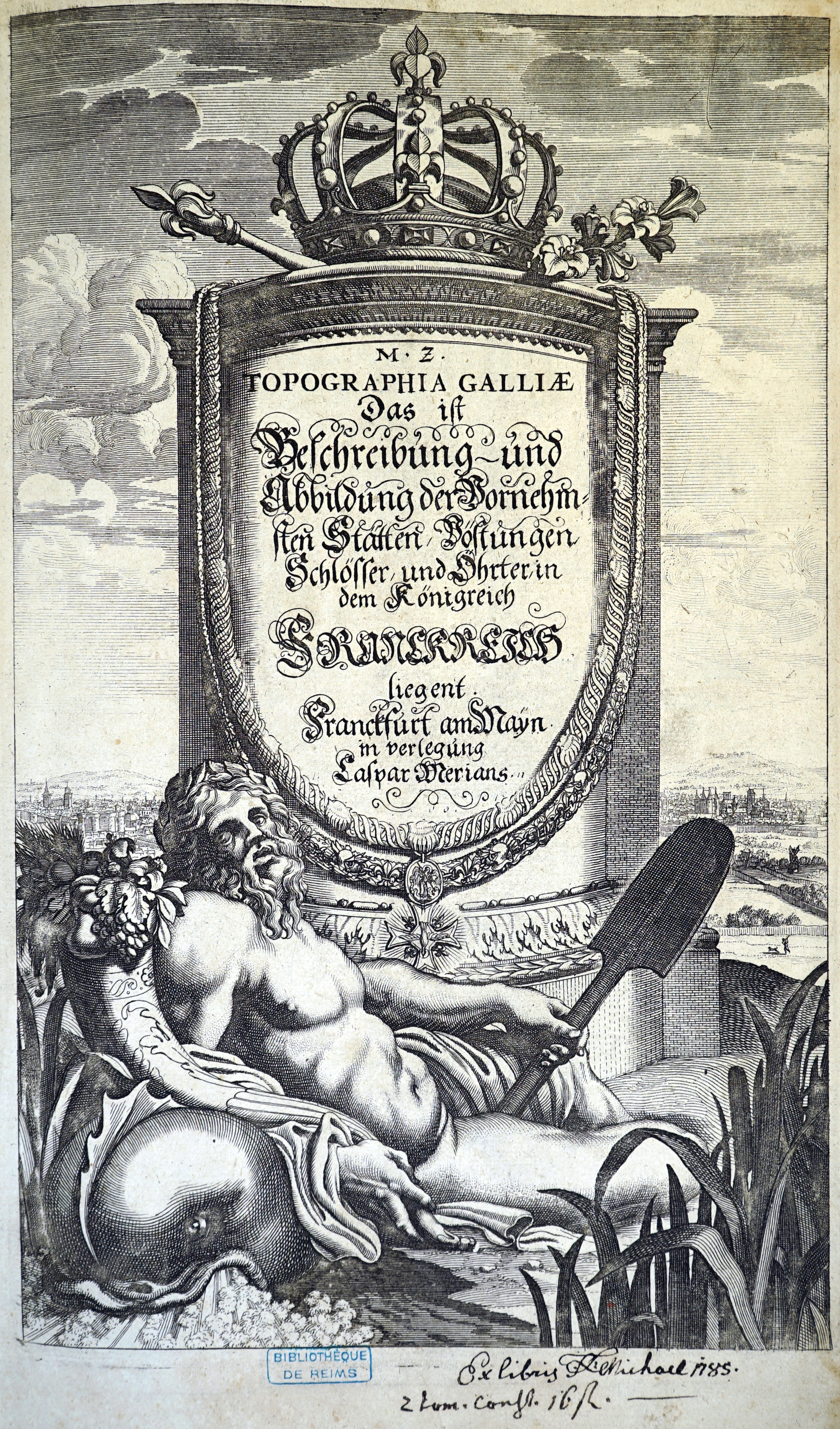 détail du livre topographia Galiae.